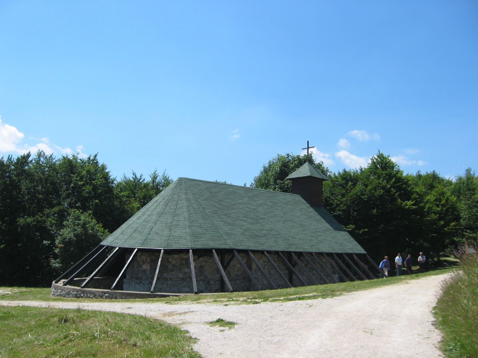 Trdinov vrh, prekrita Cerkev svetega Ilije na hrvaški strani / Trdinov vrh, church St. Ilija on Croatian side